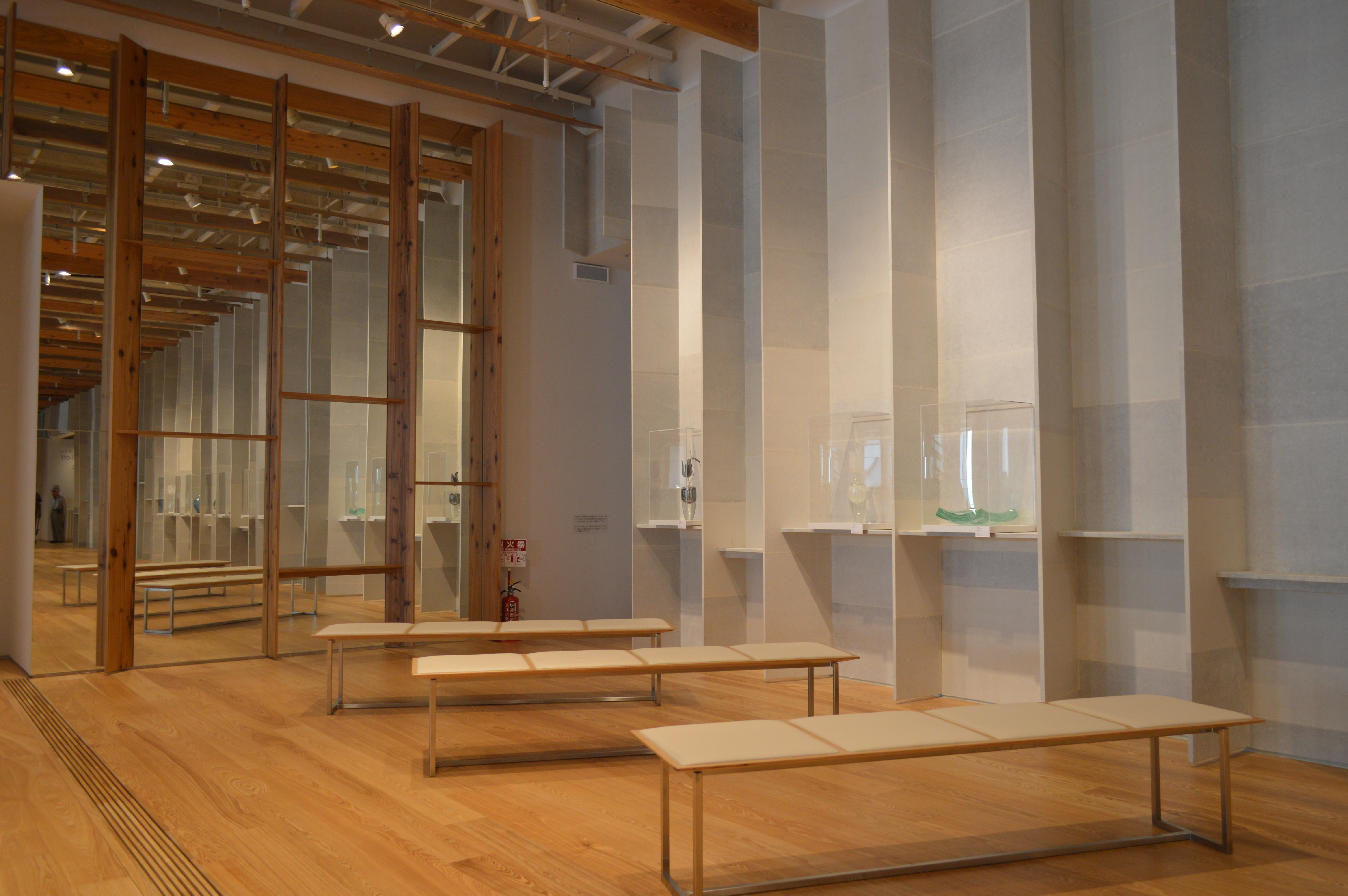 TOYAMAキラリの富山市ガラス美術館展示室前にあるグラス・アート・パサージュ（鑑賞無料）。